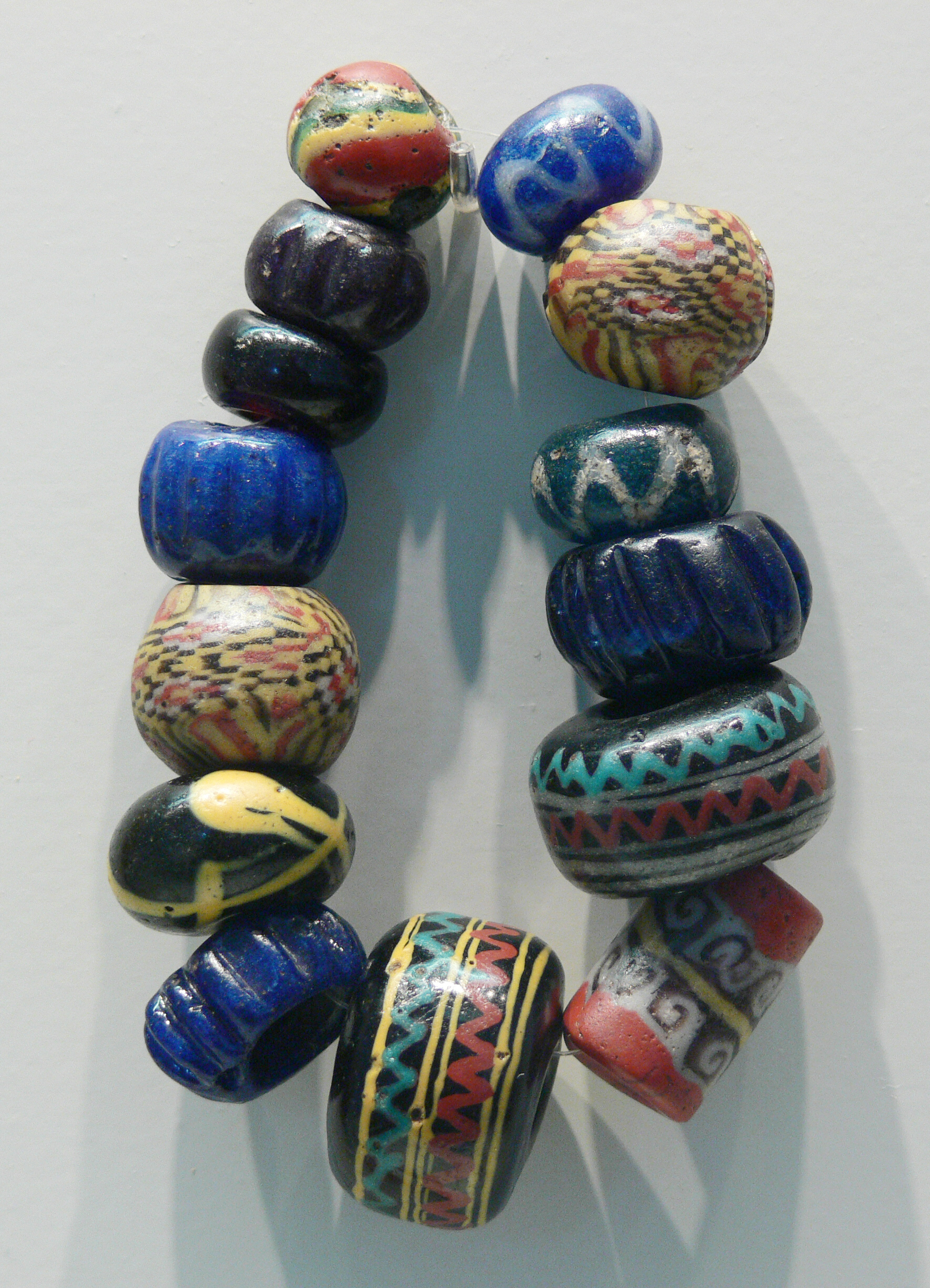 Perlenkette, 3.-4. Jh. n. Chr.; Fundort: Jucknaitschen (Juchnajcie, Polen) oder Germau (Russkoe, Russland) – im Museum nicht objektgenau ausgezeichnet Collection: Museum für Vor- und Frühgeschichte Berlin